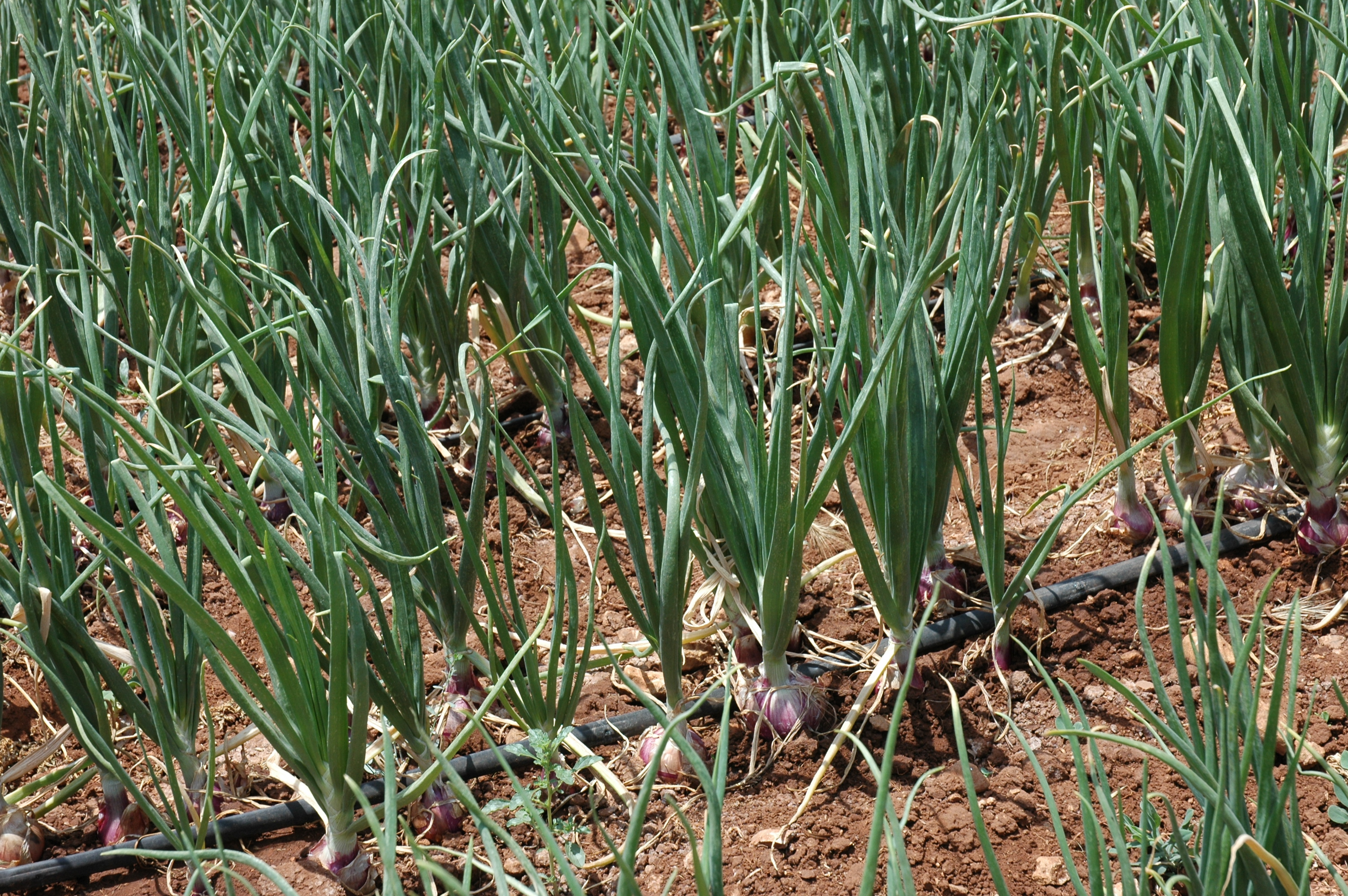 Irrigation oignons au goutte à goutte